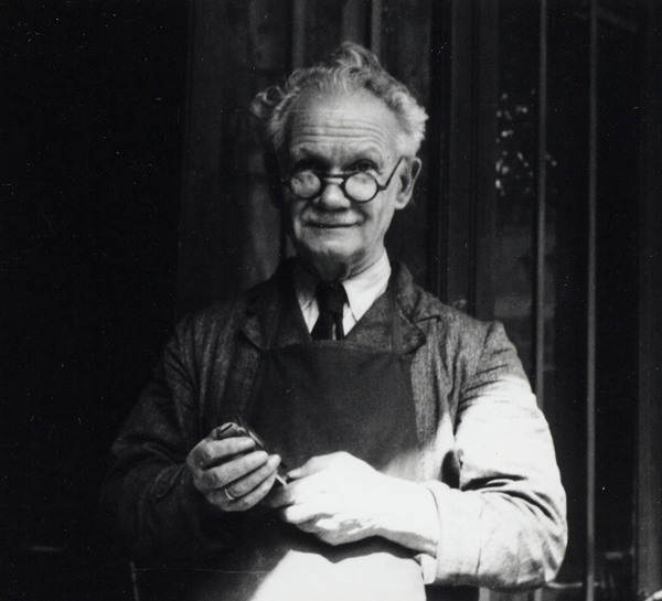 Portrait d'Étienne Mollier (1876-1962), inventeur français